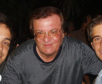 Leone di Lernia tra fans nell'estate 2007 al Papeete Beach di Milano Marittima